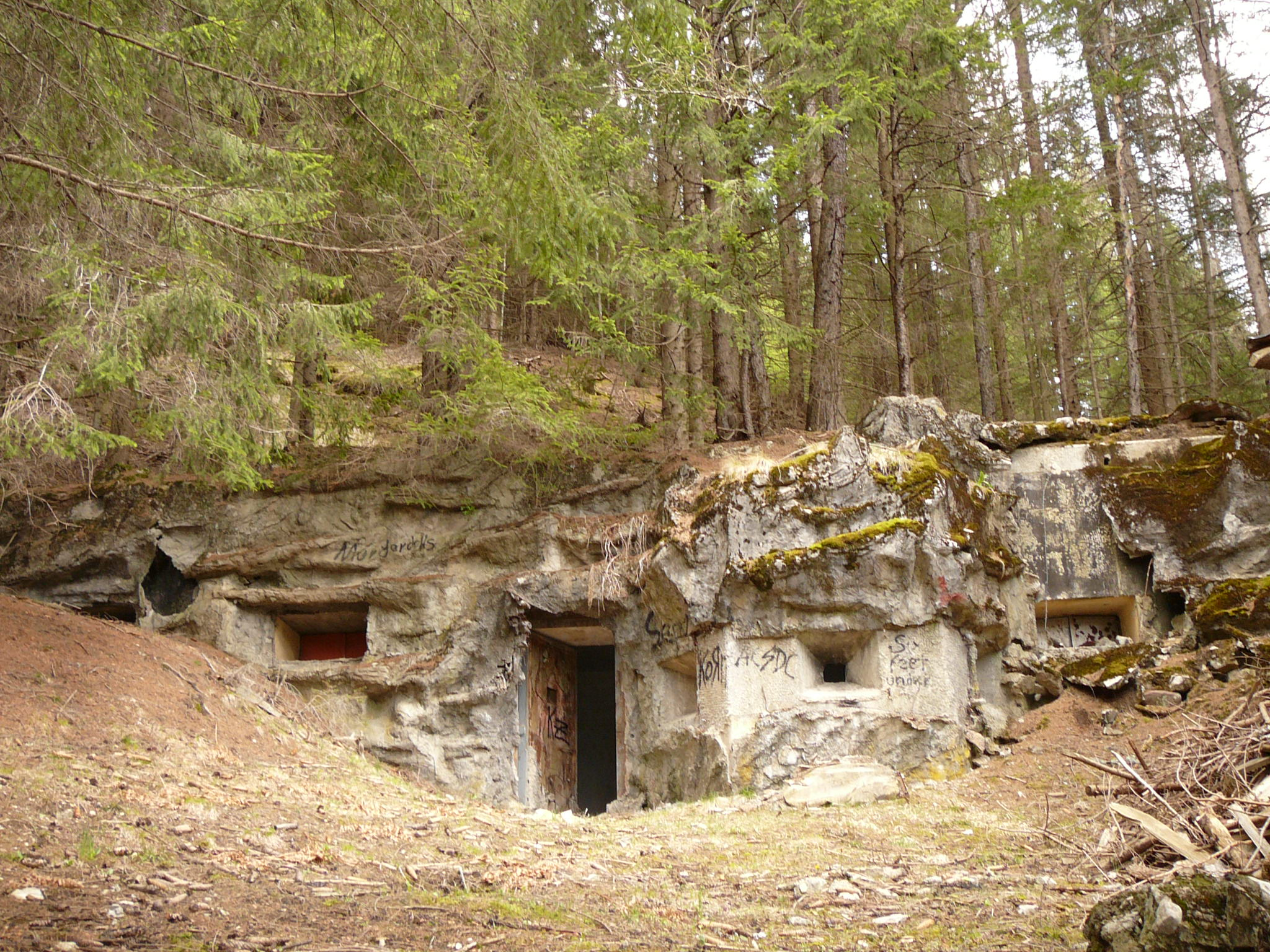 opera 6, sbarr drava